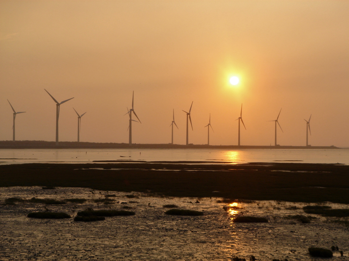 台中高美溼地風力發電機。